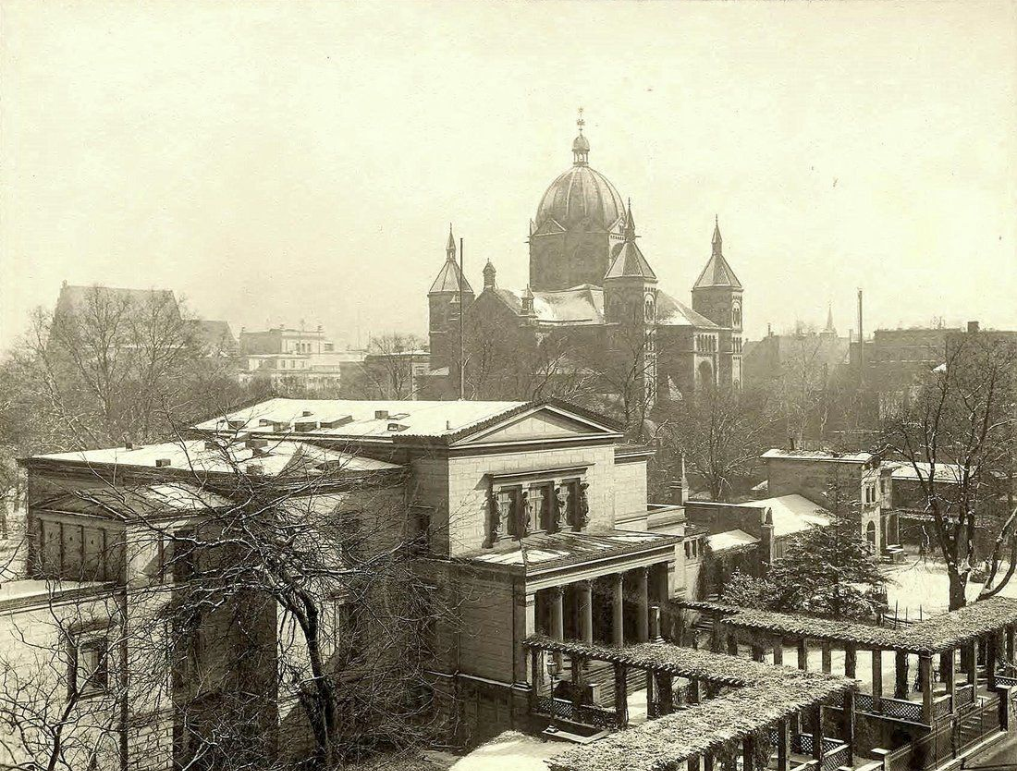 Willa Eichbornów we Wrocławiu, lata 1890-1910